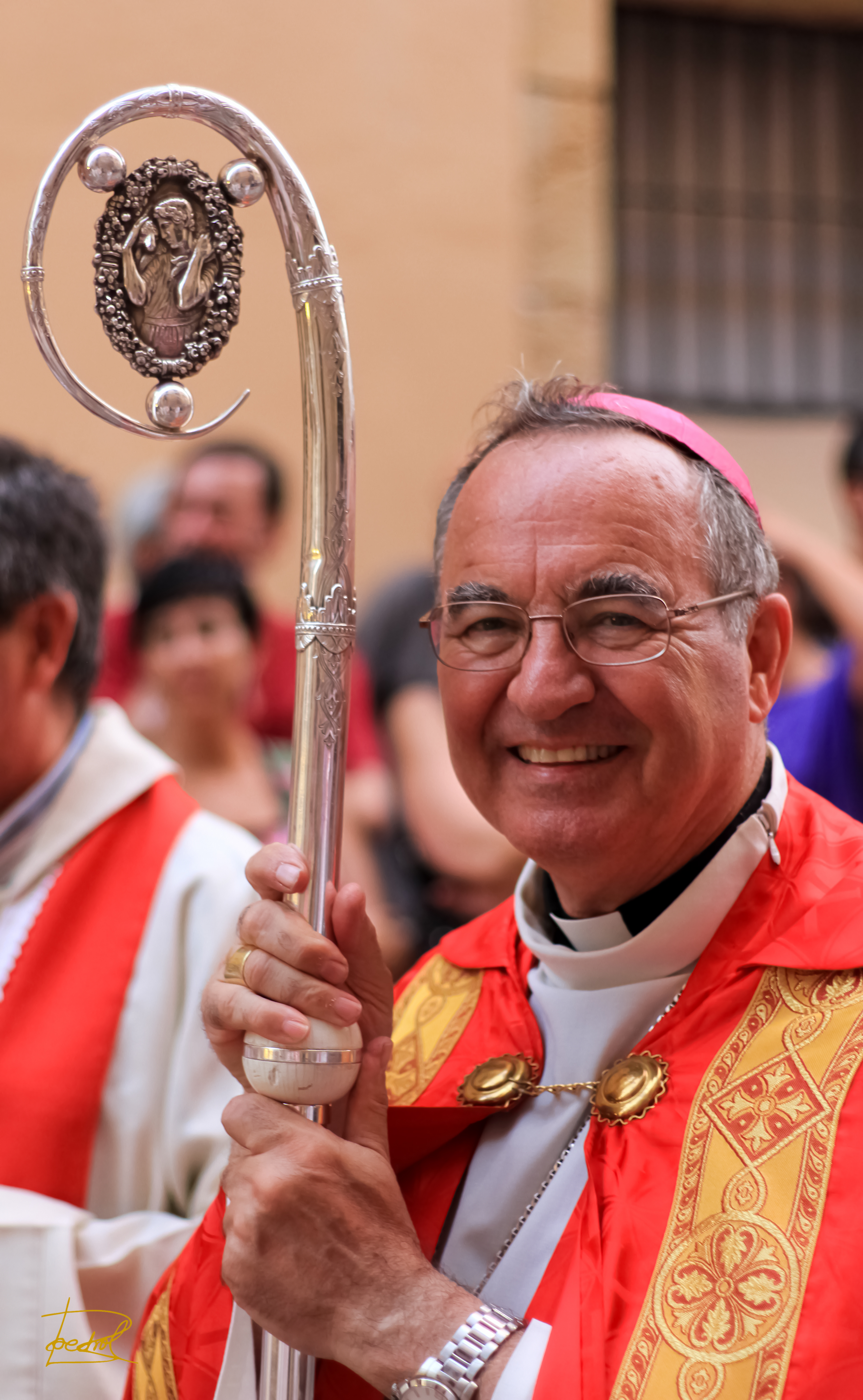 Mons. Jaume Pujol Balcells, arquebisbe metropolità de Tarragona i primat de les Espanyes. Fotografia realitzada al carrer Pare Iglesias de Tarragona el dia 19 d'agost de 2013 en motiu de la processó de Sant Magí màrtir, copatró de la ciutat de Tarragona.